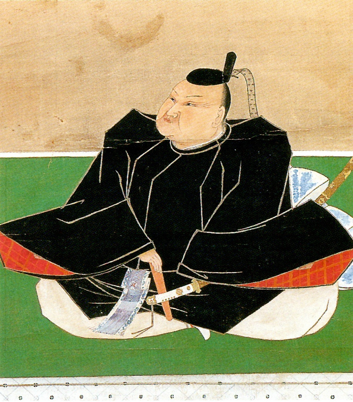 立花鑑賢の肖像。